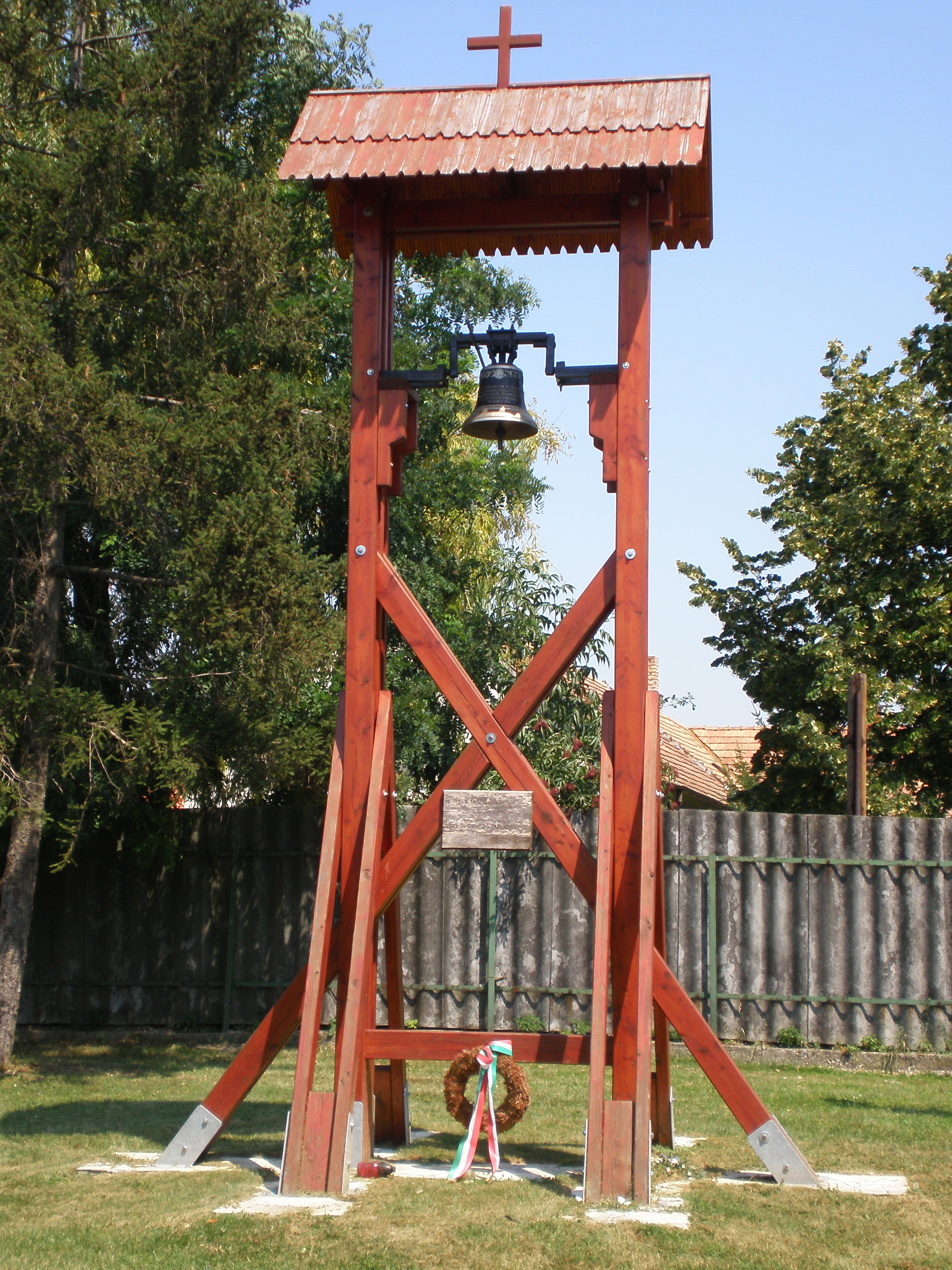 Millenniumi Emlékpark (Dunaszeg, Győr-Moson-Sopron megye, Magyarország)